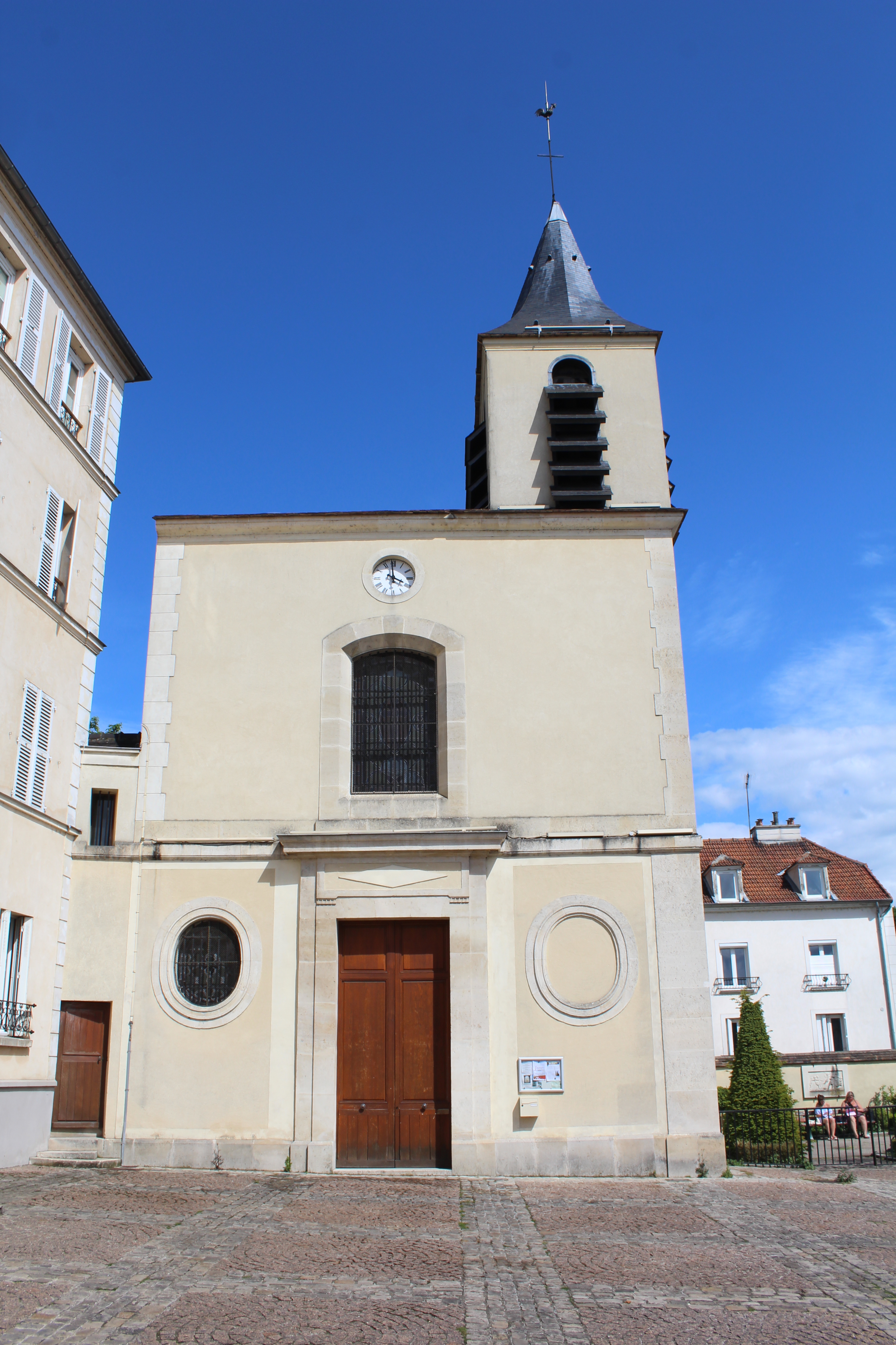 Église Saint-Maurice, Saint-Maurice, Val-de-Marne.